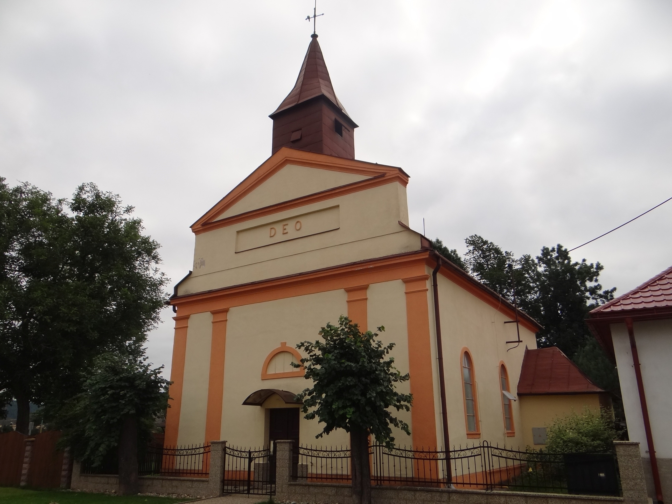 Hranovnica